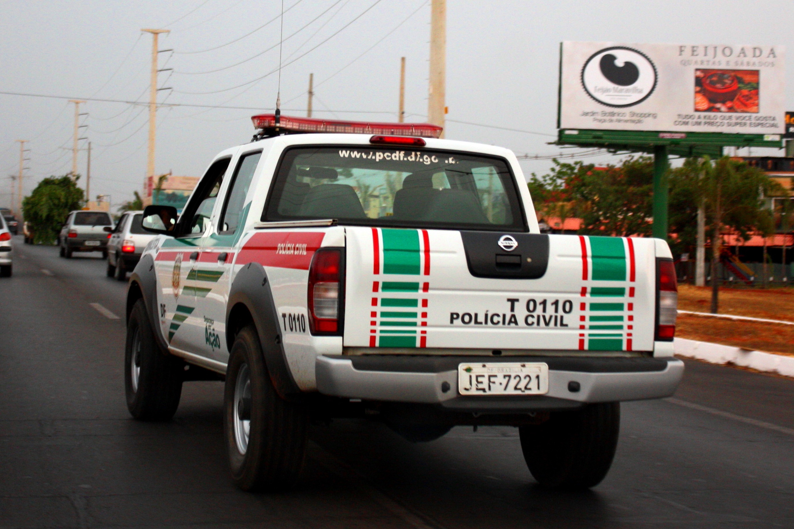 Viatura do Instituto de Criminalística da Polícia Civil do Distrito Federal